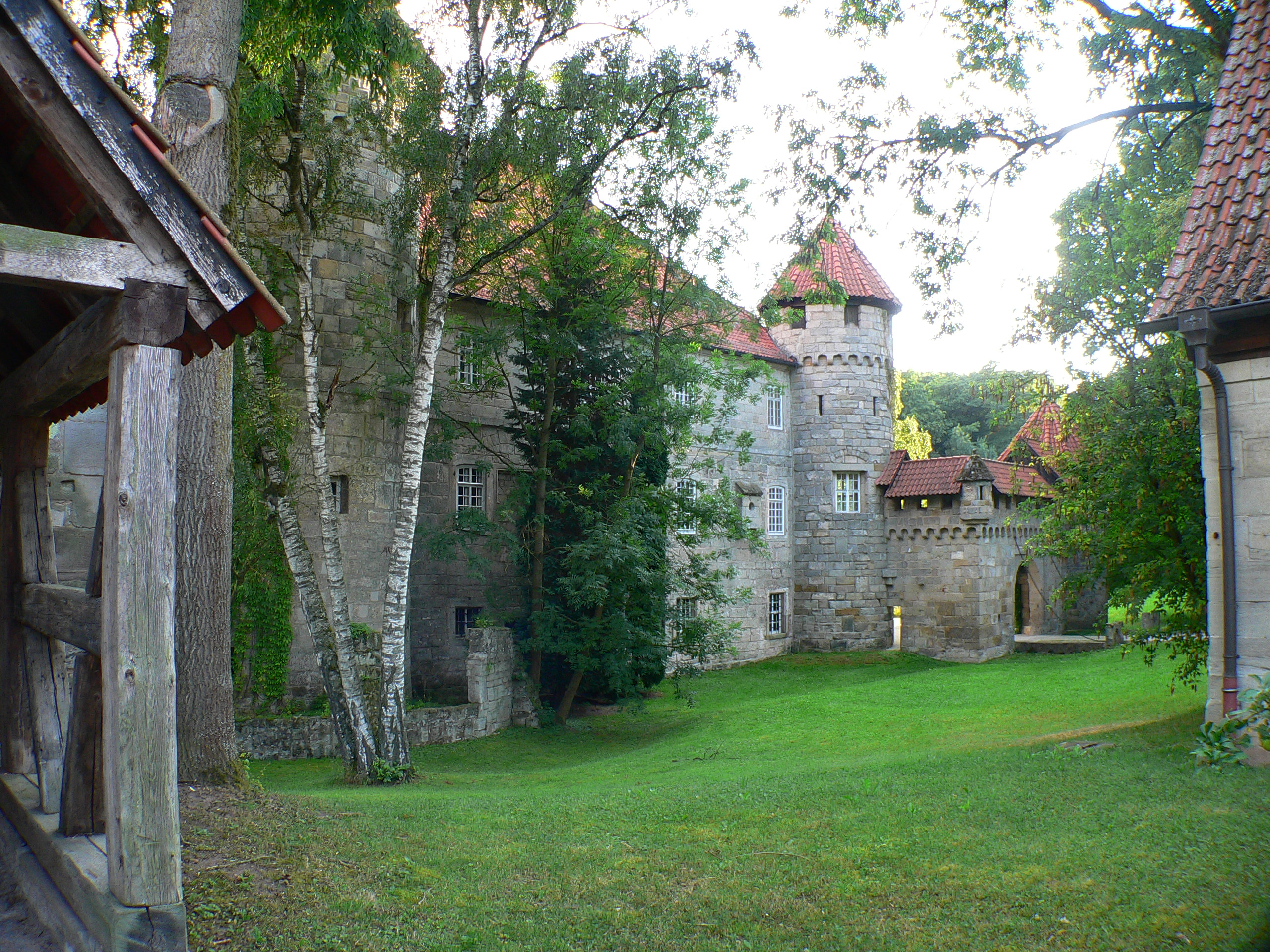 Wasserschloss in Untersiemau, Kreis Coburg, Bayern